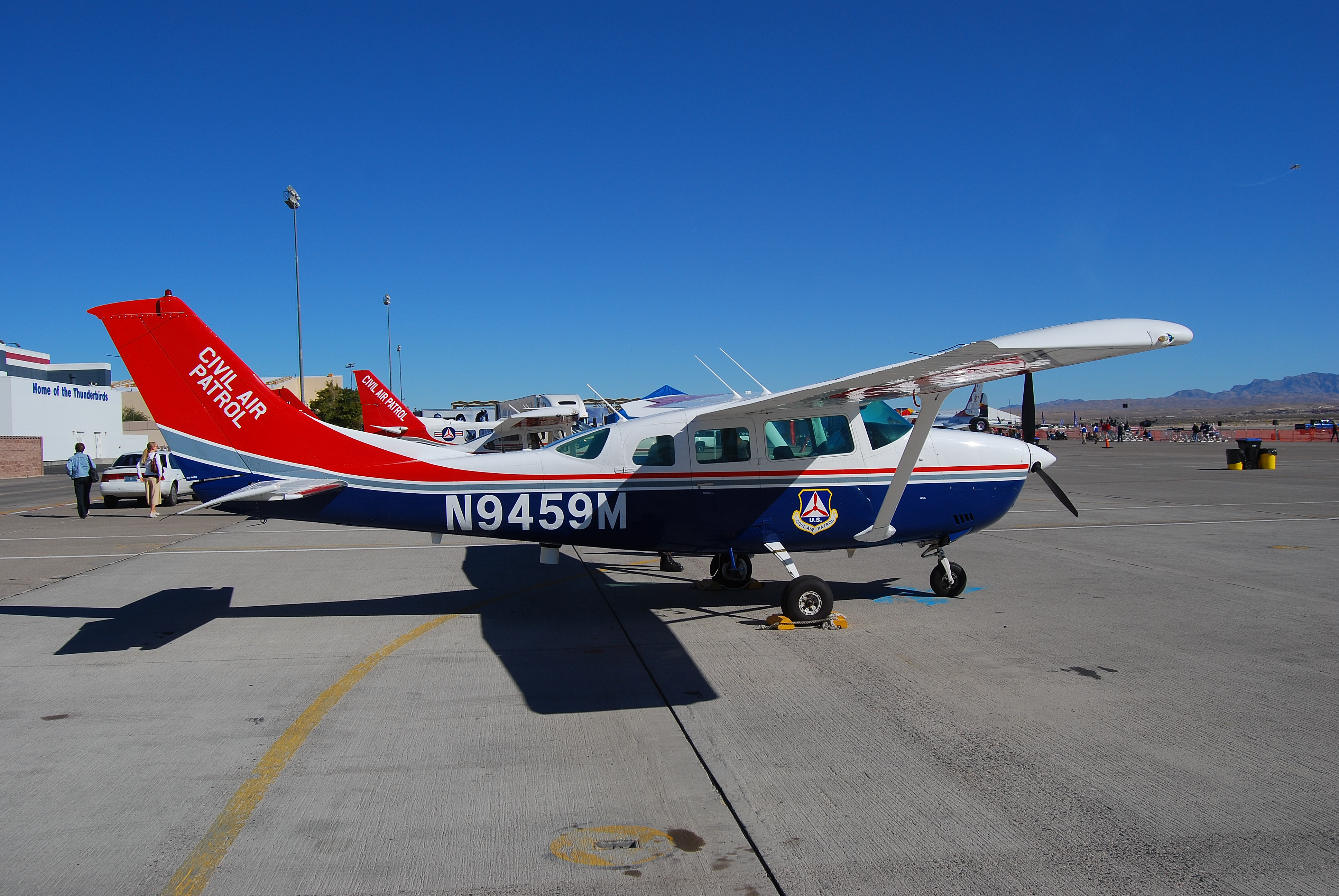 Cessna U206G Civil Air Patrol N9459M